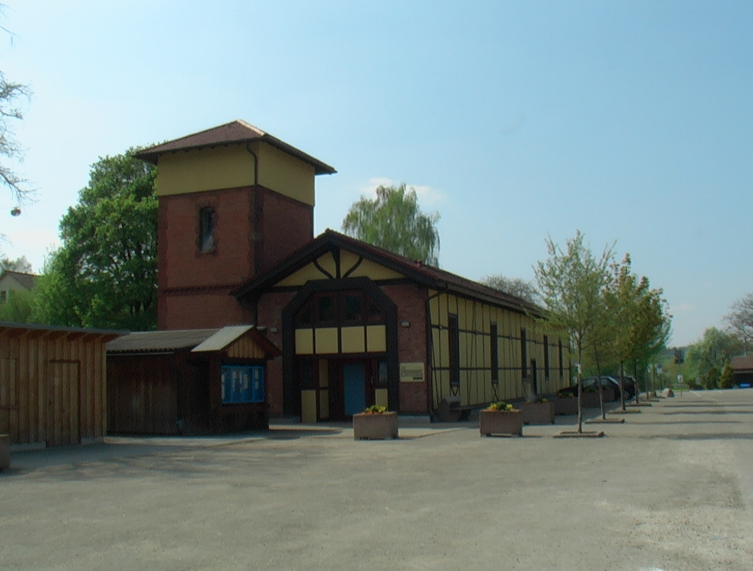 Der Ehemalige Lokomotivschuppen in der Mühlwiesenstr. 41 in Gönningen wurde 1900 mit Werkstatt und Wasserturm erbaut. In dem Gebäude wurden die Lokomotiven der Gönninger Bahn abgestellt. In der angebauten Werkstat wurden Wagen und Lokomotiven gewartet und repariert. Die Strecke wurde 1982 stillgelegt. Seit 2002 wird der Lokschuppen vom Förderverein Lokschuppen e.V. genutzt und zum Kulturzentrum umgebaut.